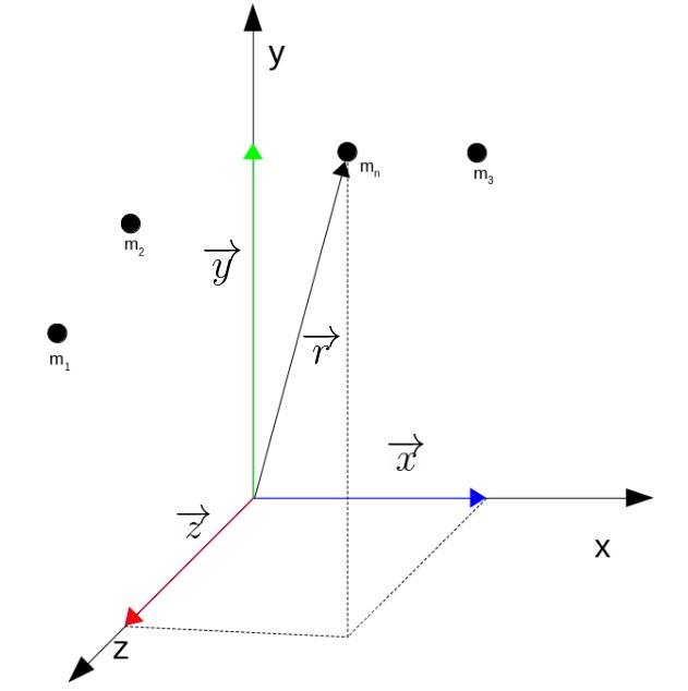 Uma análise feita com partículas existentes em um sistema de coordenadas em três dimensões para localizar o Centro de Massa. A imagem descreve a divisão de vetores unitários que descrevem a trajetória de cada elemento, revelando a posição do vetor resultante (Centro de Massa).